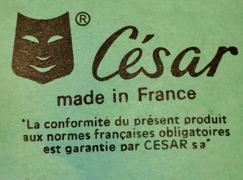 Etiquette présente sur les masques de la marque César